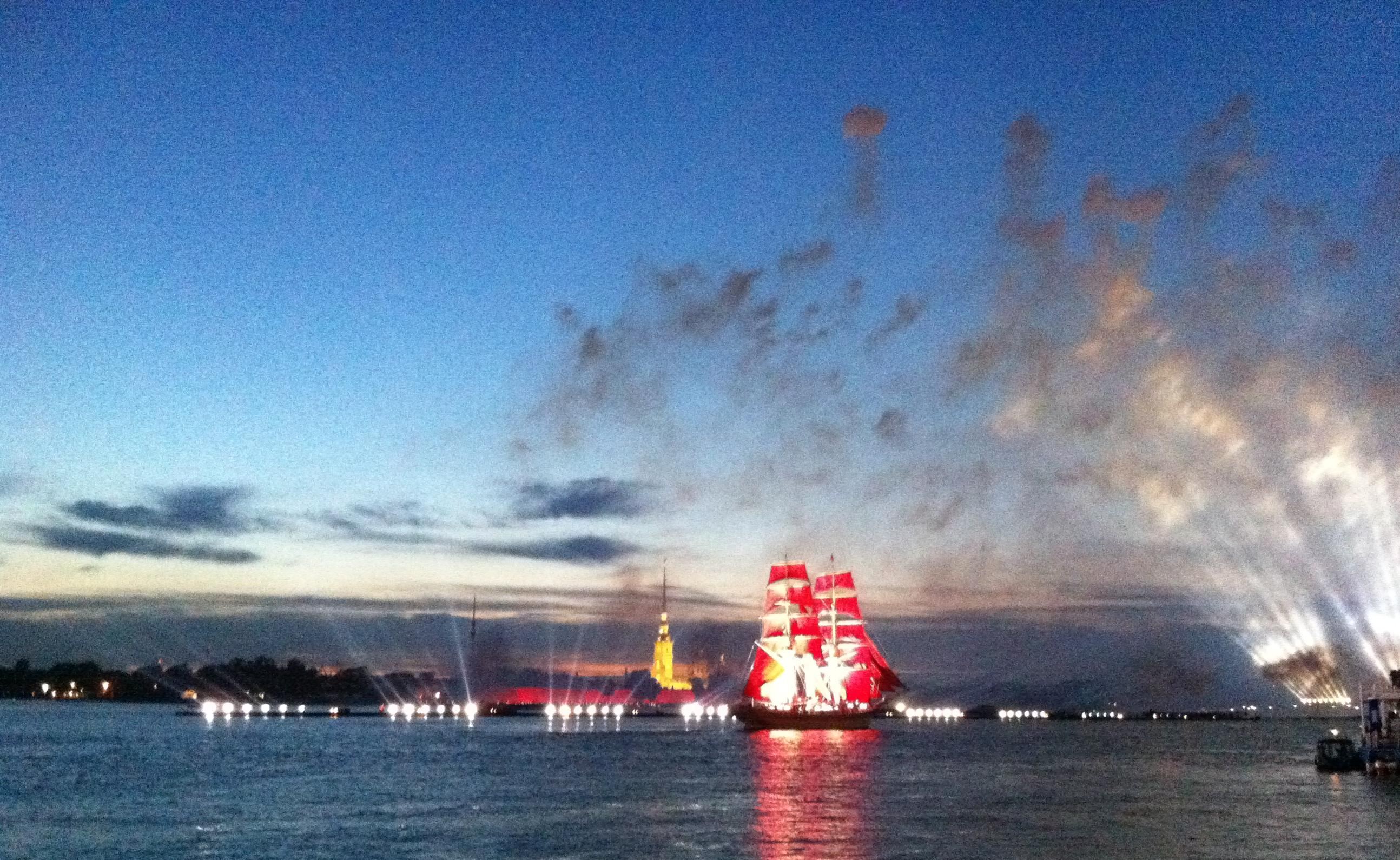 Бриг «Тре Крунур» на празднике выпускников Алые паруса под алыми парусами во время светового пиротехнического шоу над акваторией Невы.